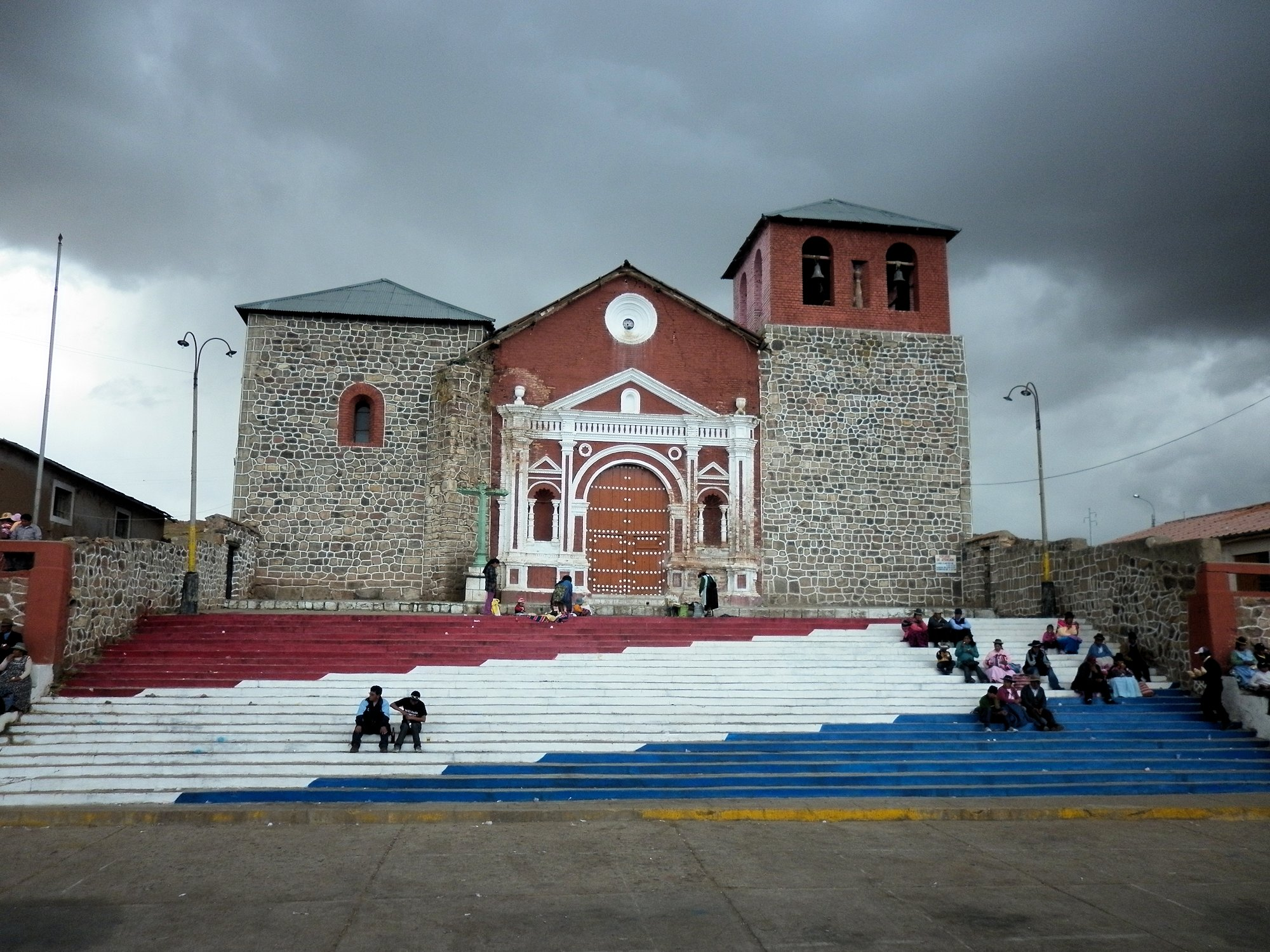 Catedral de Paucarcolla, antigua capital de Puno.